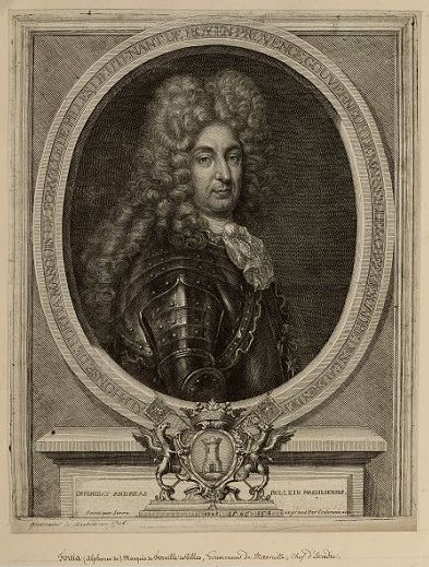 Portrait de Alphonse de Fortia-Piles (mort en 1711), chef d'escadre des galères, commandeur de Saint-Louis. Gravure de Jacobus Coelemans